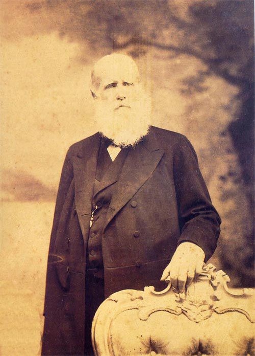 Fotografia de Dom Pedro II.